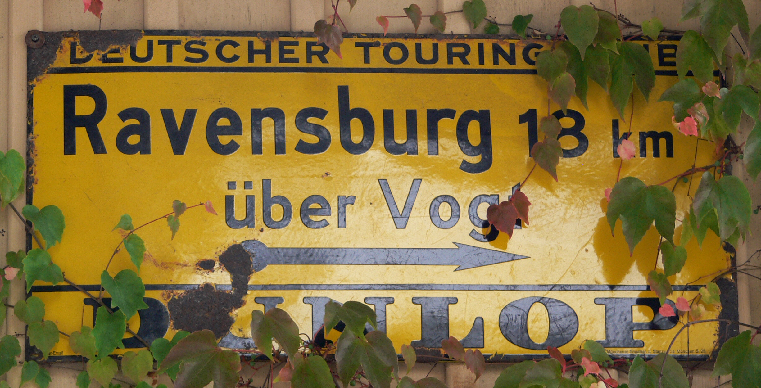 Karsee, Stadt Wangen im Allgäu, Landkreis Ravensburg Historischer Wegweiser des Deutschen Touring-Clubs mit Dunlop-Werbung, angebracht an einer Hauswand und von Pflanzen überwuchert